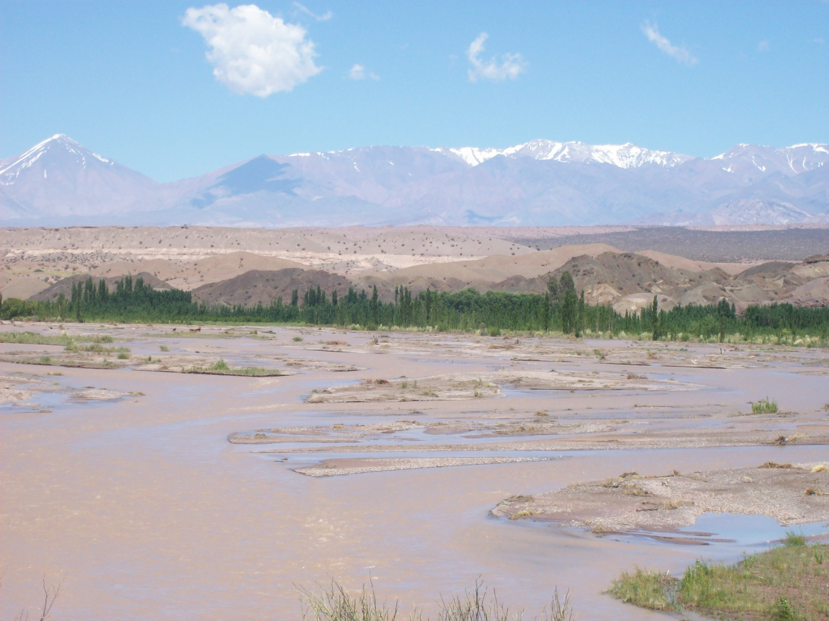 Río San Juan cerca de Calingasta, Provincia de San Juan, Argentina. Al fondo, Cordillera de los Andes.